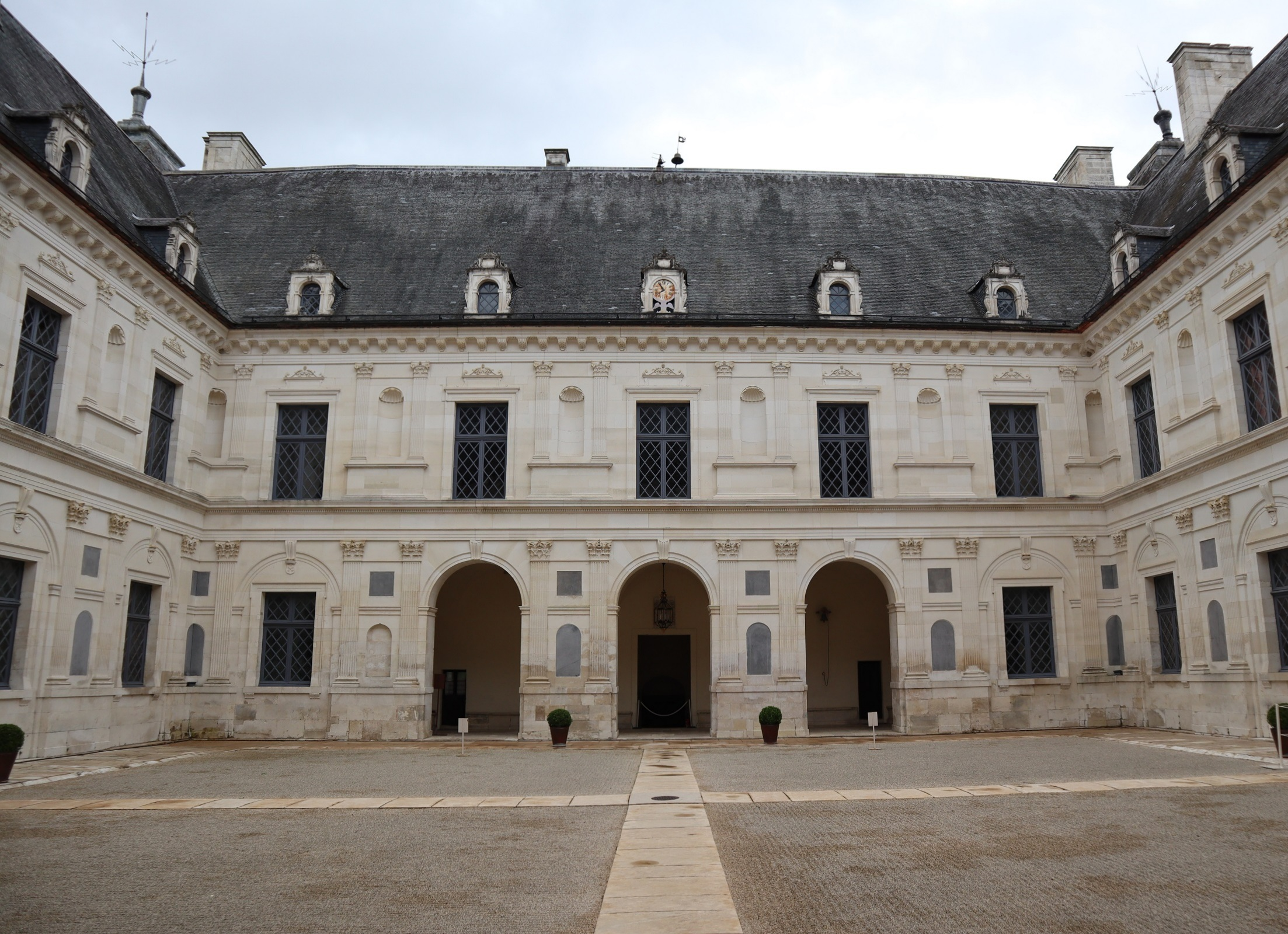 Cour intérieur du château d'Ancy-le-Franc (89).